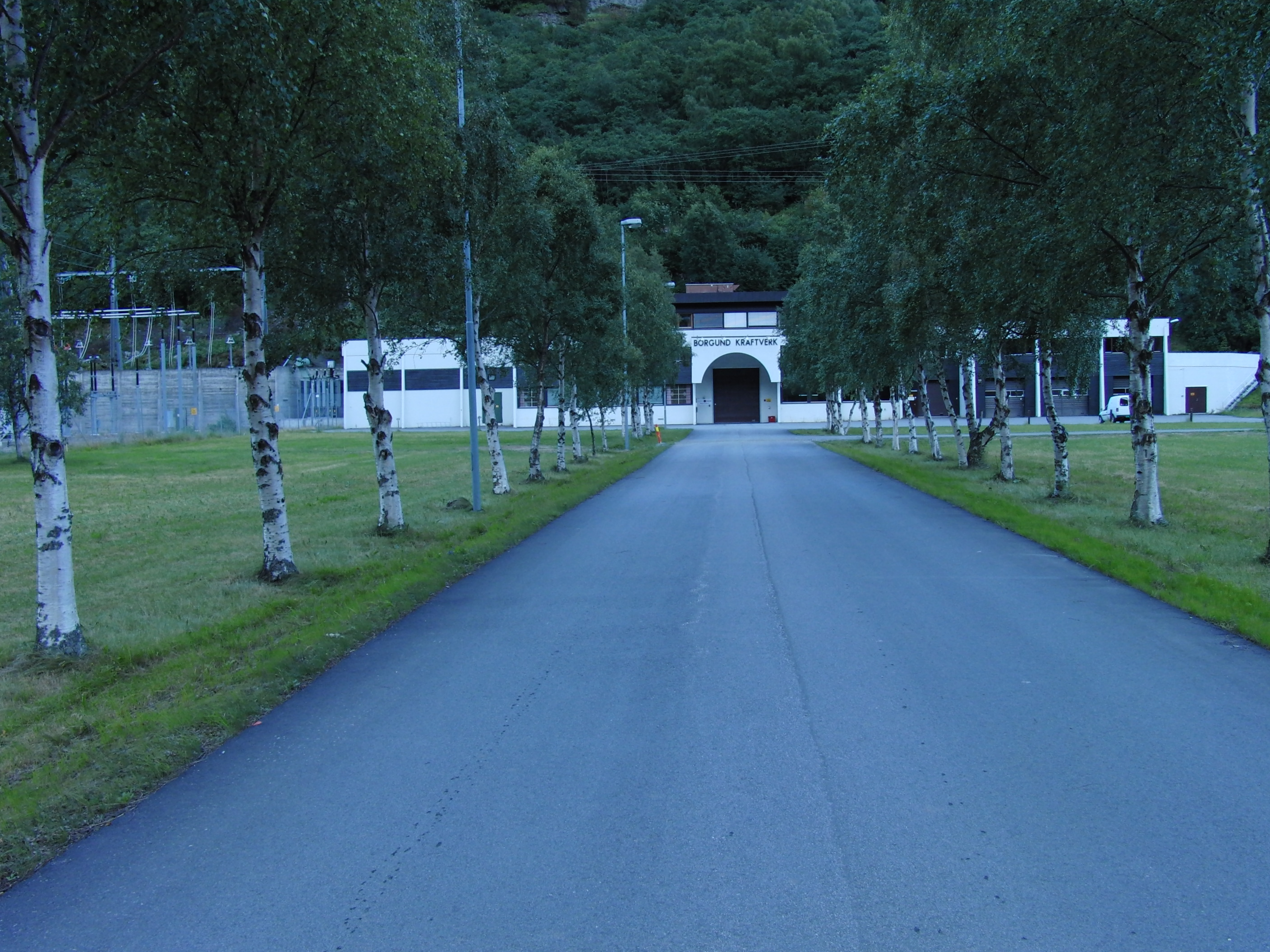 Borgund kraftverk